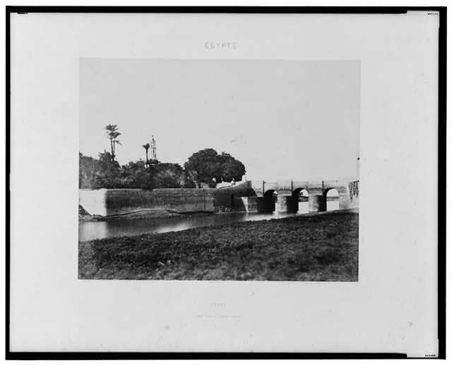 قنطرة على الترعة الإبراهيمية بمدينة أسيوط المصرية. تصوير فيلكس تينار (1817 ـ 1892)